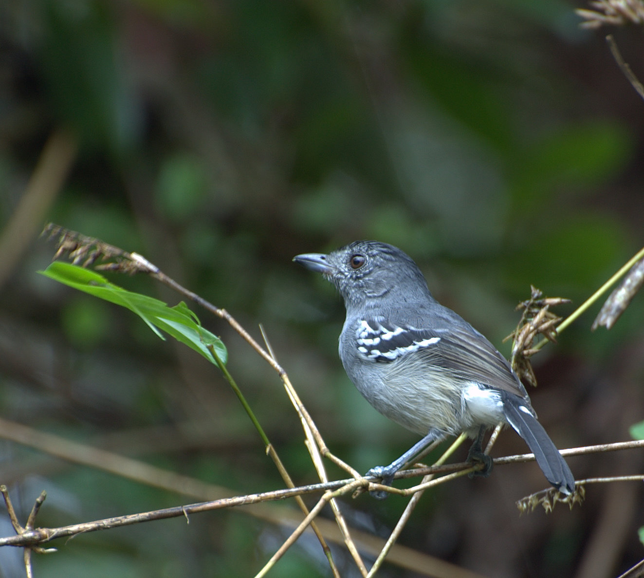 Thamnophilus caerulescens Rodovia Empei Hiraide SP-139, próximo à cidade de Registro-SP Variable Antshrike